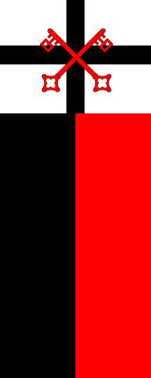 Flagge Andernach